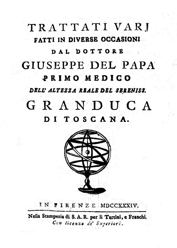 Trattati varj fatti in diverse occasioni dal dottore Giuseppe Del Papa primo medico … del sereniss. Granduca di Toscana. - In Firenze : nella stamperia di S.A.R. per li Tartini e Franchi, 1734. - VI, [2], 228 p. : ill. ; 4º .